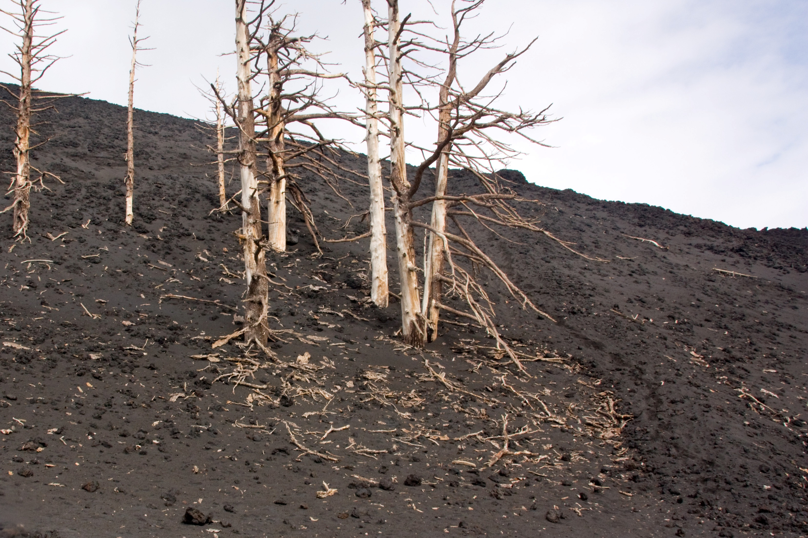 Volcan Etna - Sicile, Italie Arbres asphyxiés lors de l'éruption de 2002